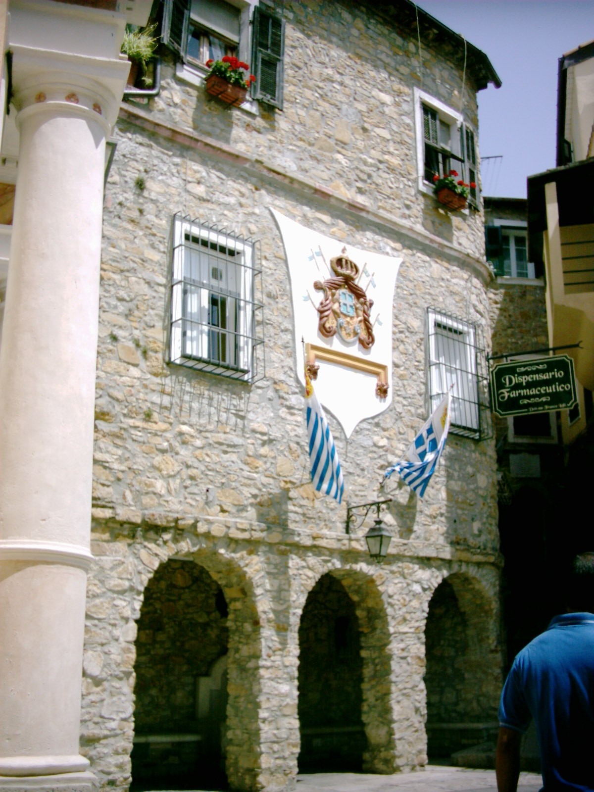 Seborga, Liguria, Italy - Palazzo